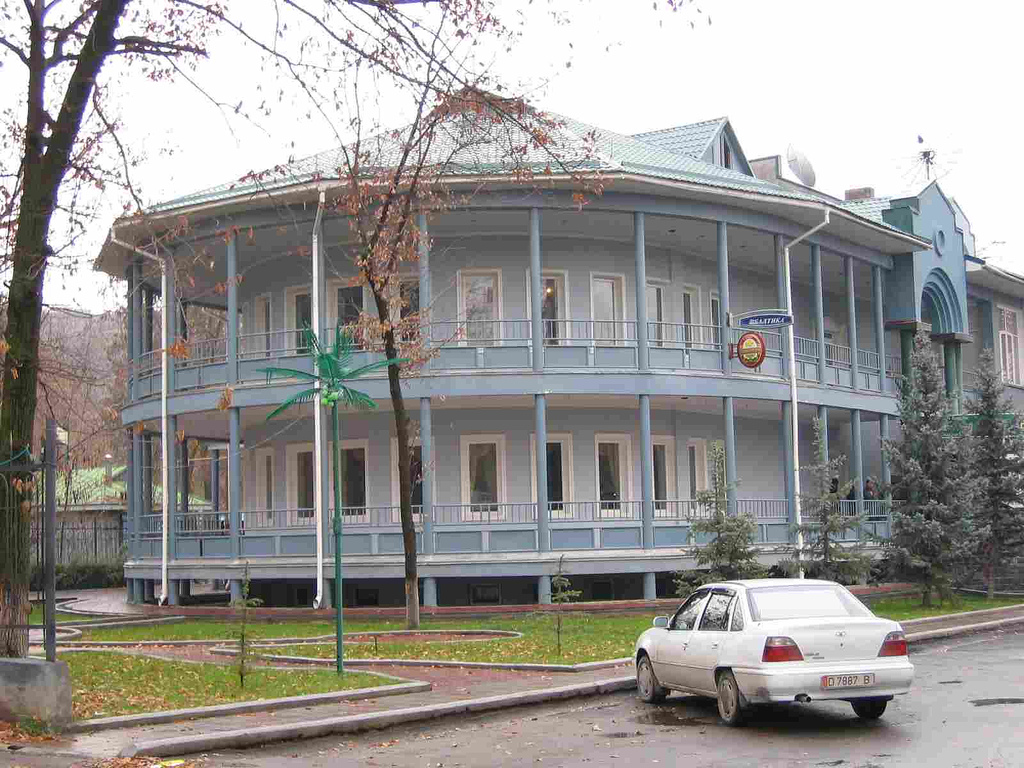 Jalalabad 3